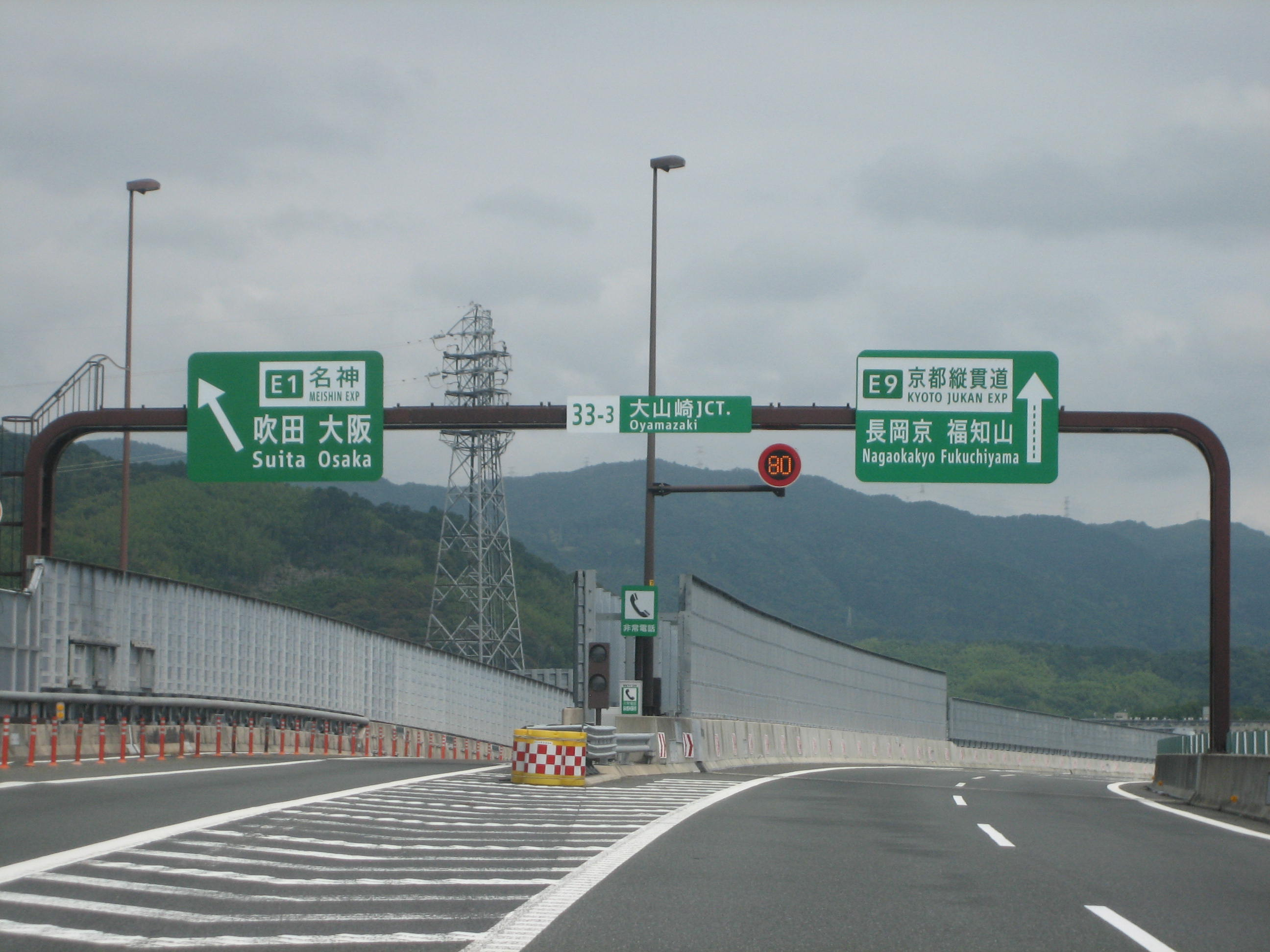 大山崎JCT第二分岐